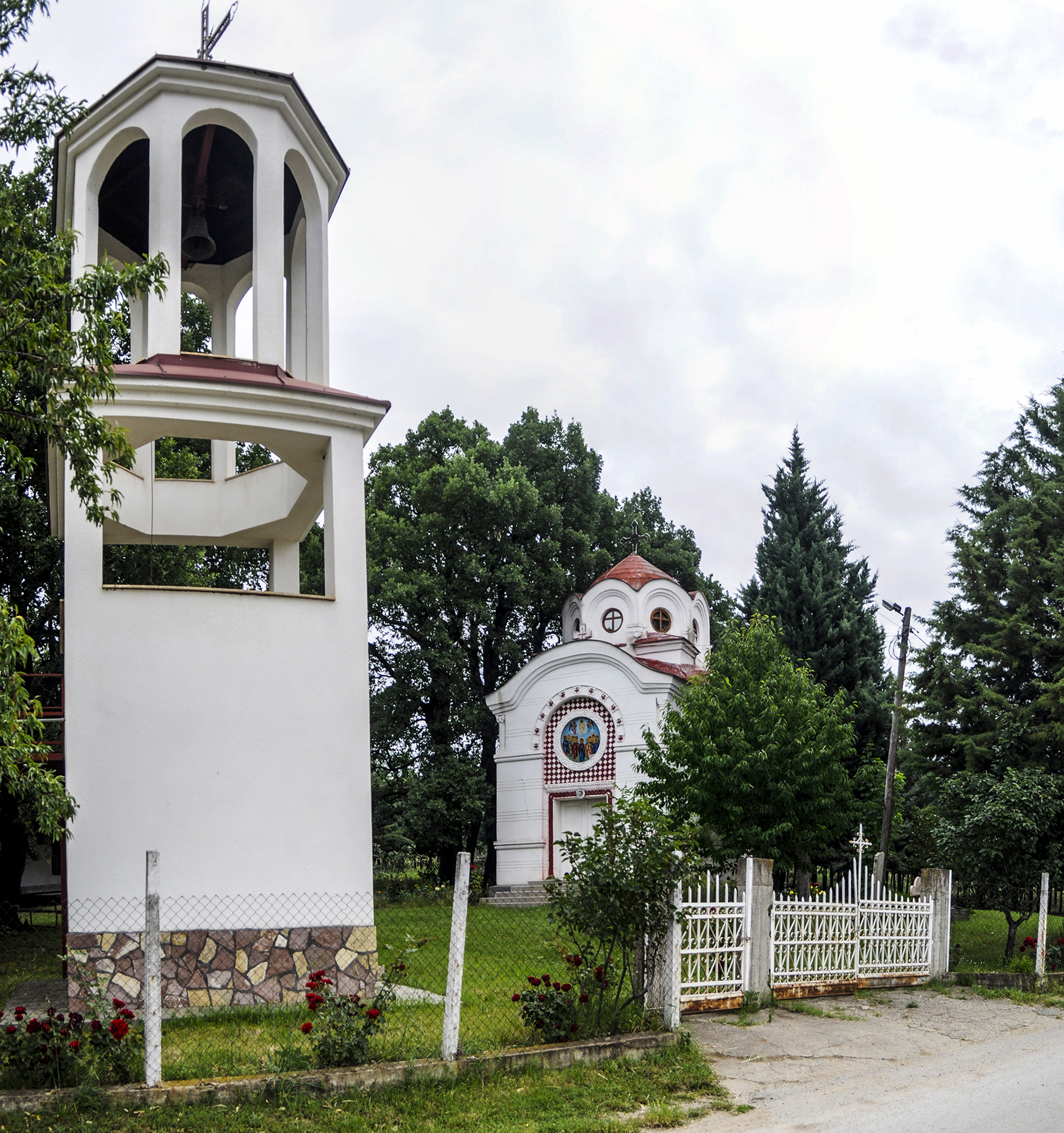 Црквата Свети Спас во Бунарџик, ја опкружува убава природа.